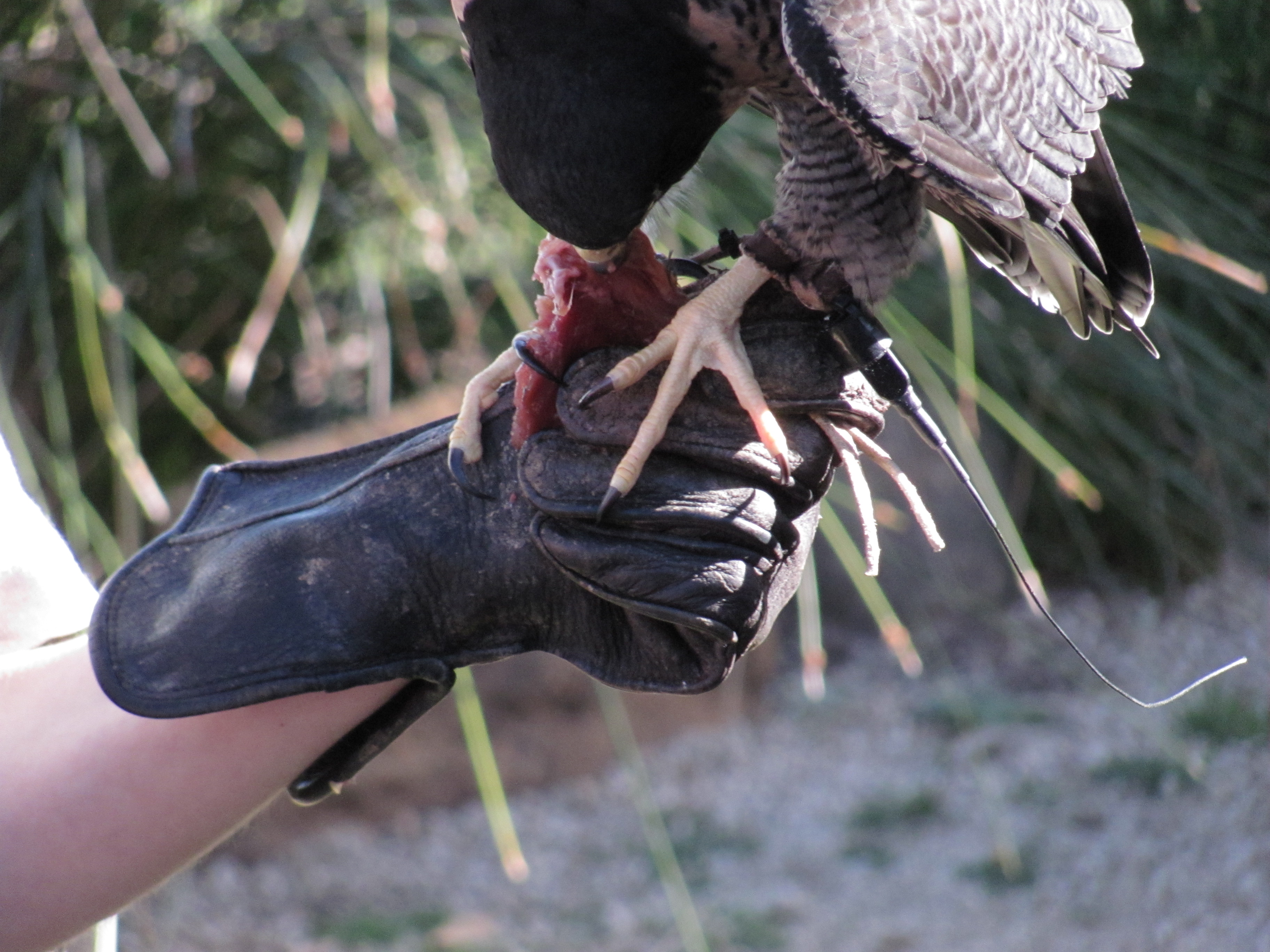 Peregrine Falcon (Falco peregrinus)